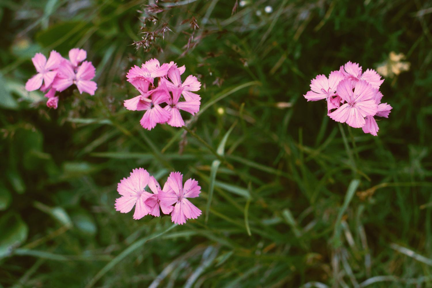 Voralpen-Karthäuser-Nelke (Dianthus carthusianorum subsp. alpestris), Nelkengewächse (Caryophyllaceae) - Österreich/Austria/Autriche: Kärnten/Carinthia, Nockberge, Gregerlenock